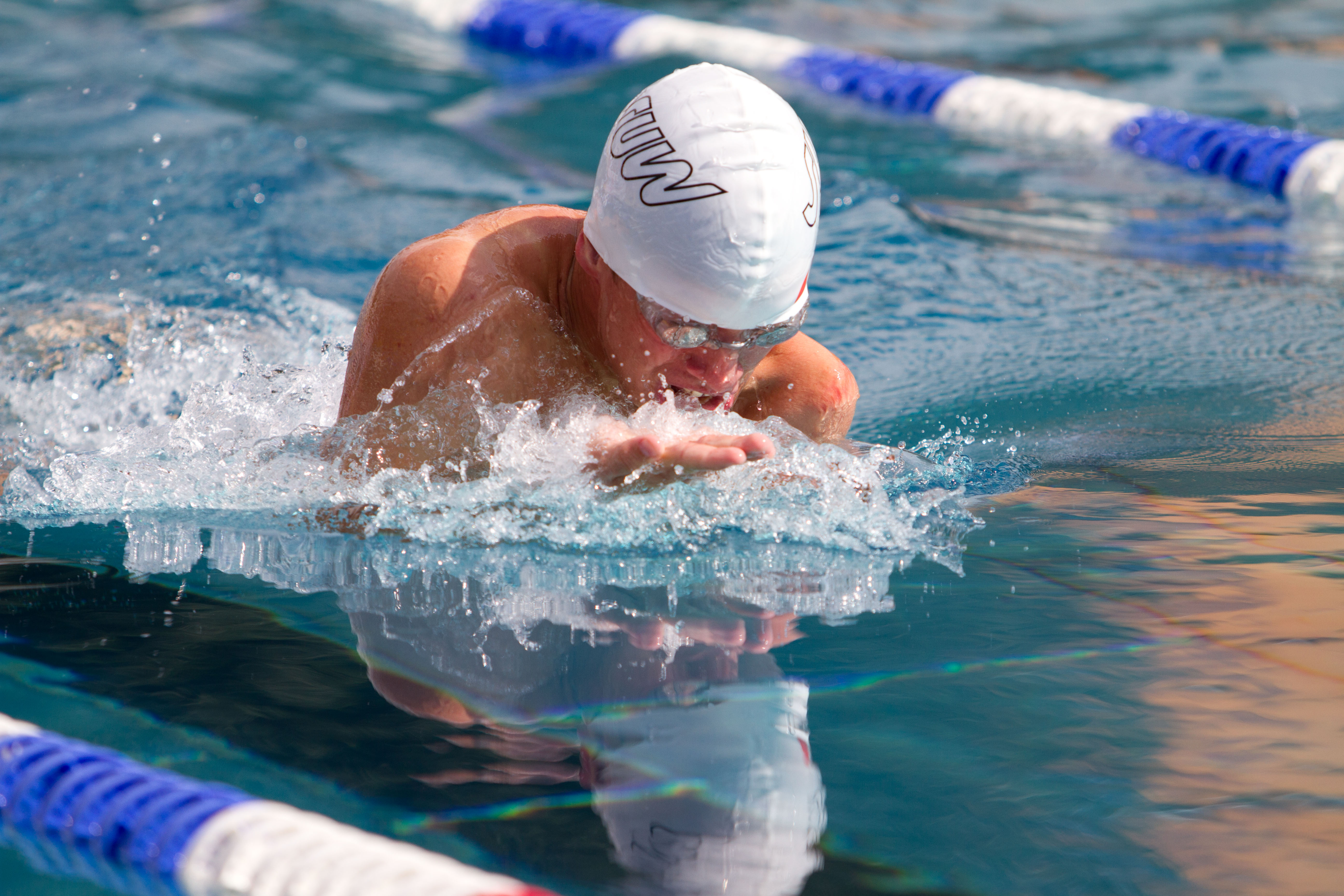 Andreas Onea beim Schwimmen 2012